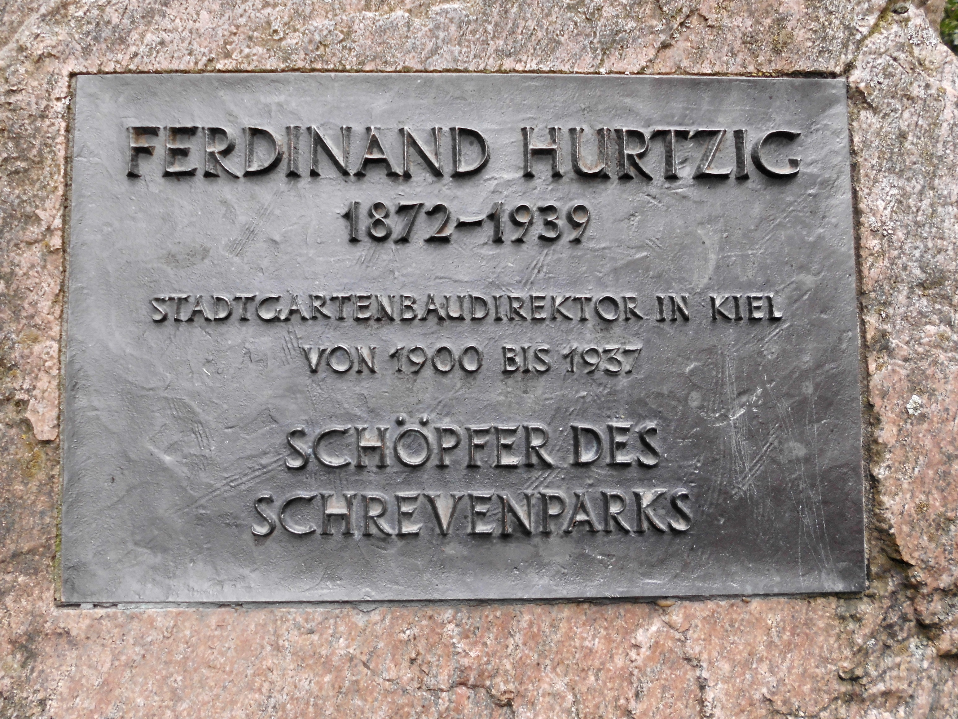 Detailansicht der Gedenkplakette Huitzig im Schrevenpark im Kieler Stadtteil Schreventeich. Siehe auch Gesamtaufnahme.